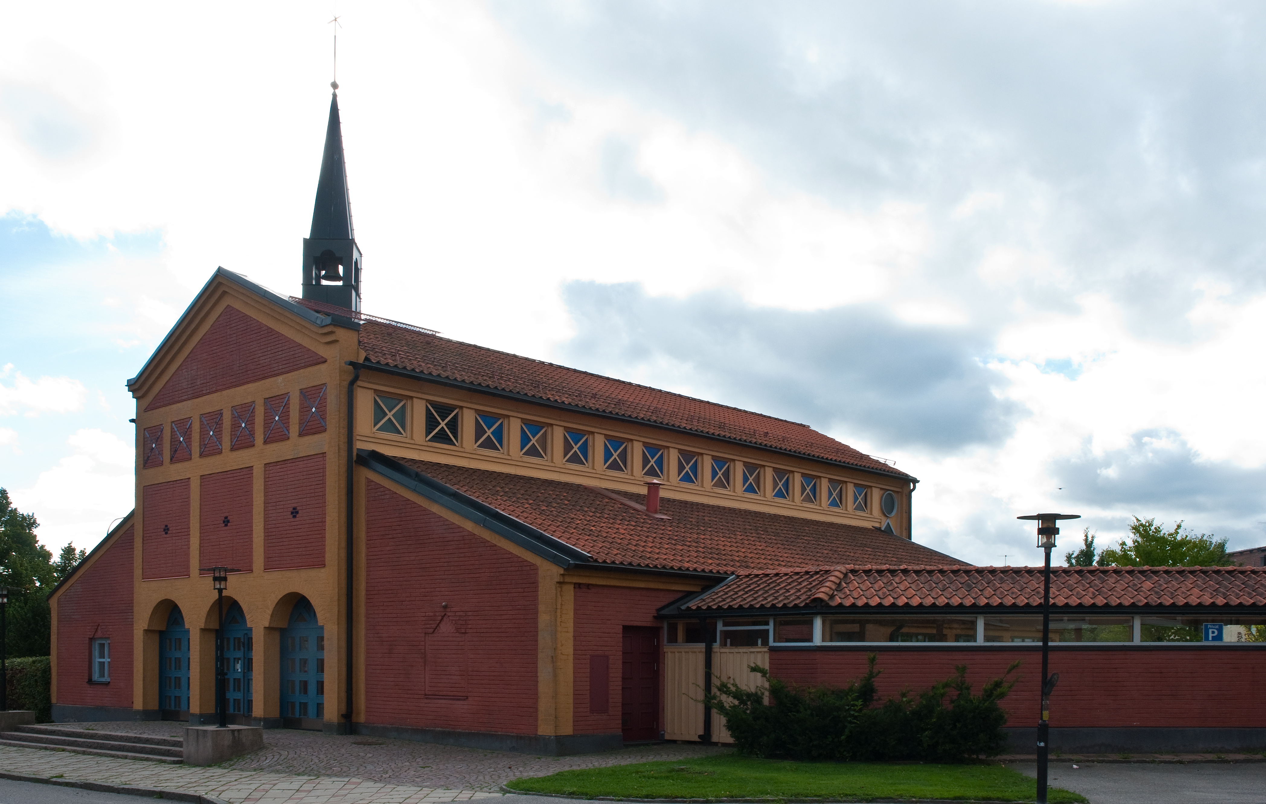 Sankta Katarina kyrka i Nyköping